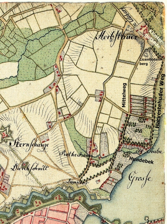 Altona, Hamburg, Harburg. Aufgenommen in den Jahren 1789 bis 1796 unter der Direktion des Majors Gustav Adolf von Varendorf durch Offiziere des Schleswigschen Infanterieregiments; Ausschnitt Harvestehude